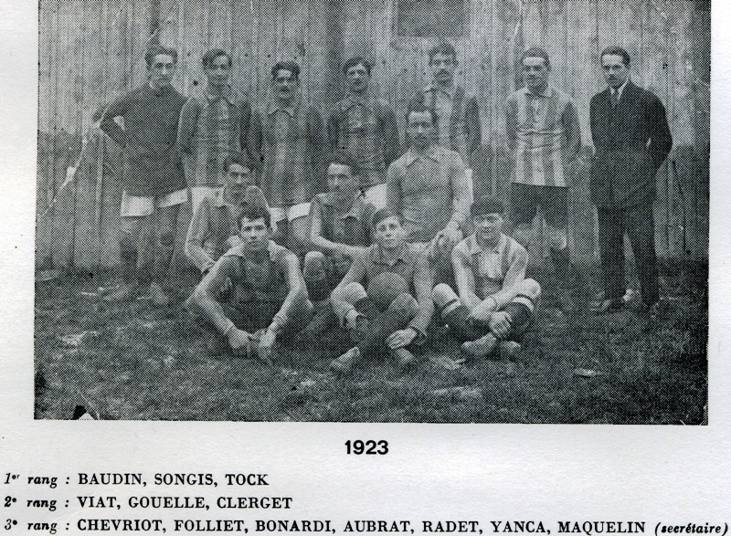 Sport Athlétique Sézannais 1923